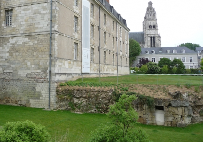 Vestiges des ramparts gallo-romains, avec la subsistance d'une poterne, qui constituaient le soubassement du château de Tours.